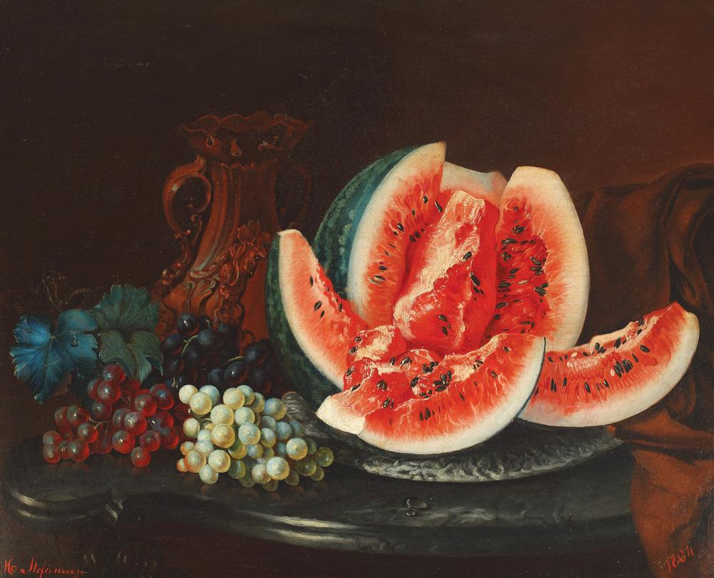 Mihail Ştefănescu - Natură statică cu fructe, ulei pe pânză, 56,5 x 69 cm, semnat stânga jos și datat dreapta jos, cu roșu, M. Ștefănescu, 1864.